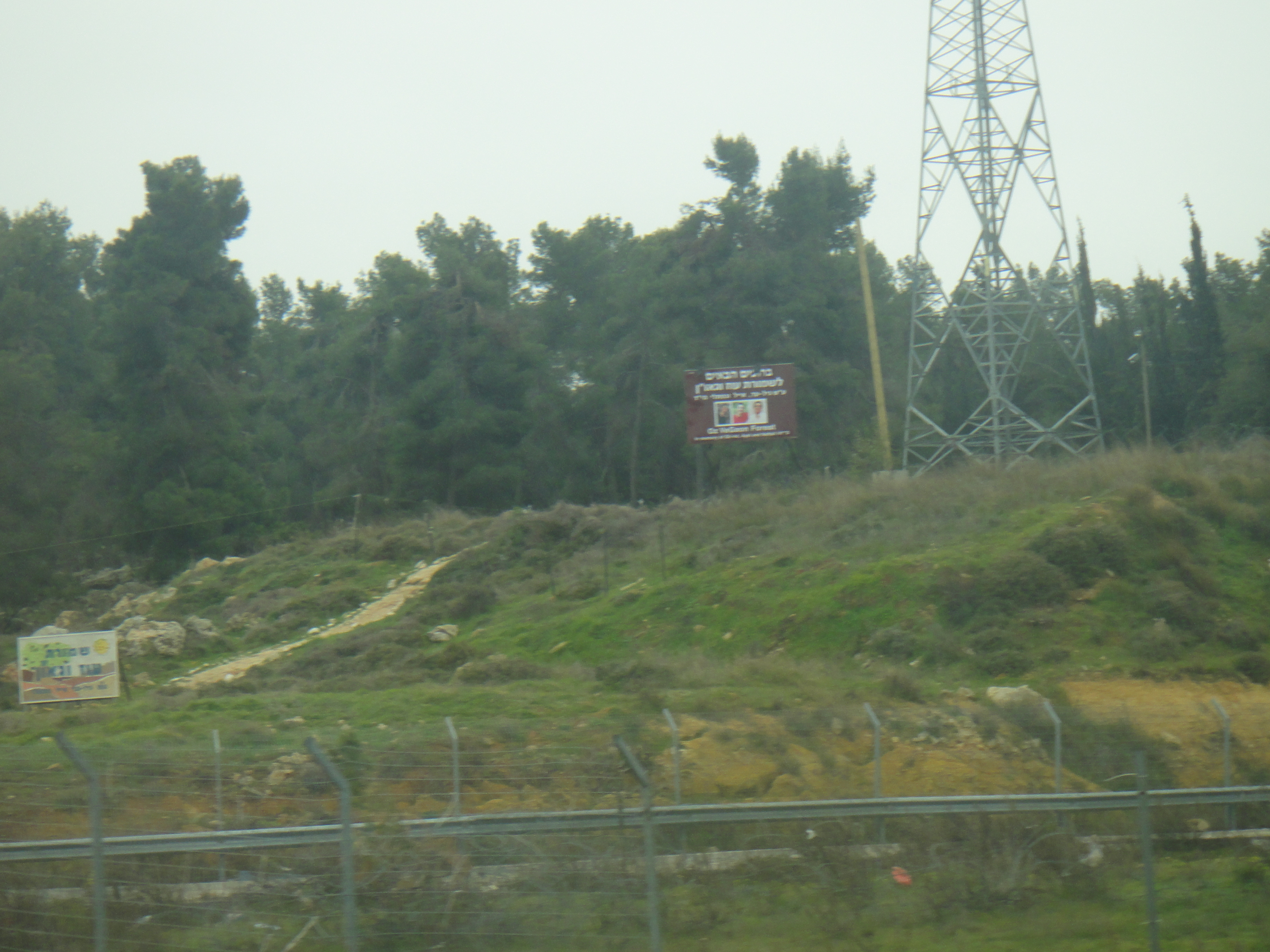 שמורת עוז וגאו"ן